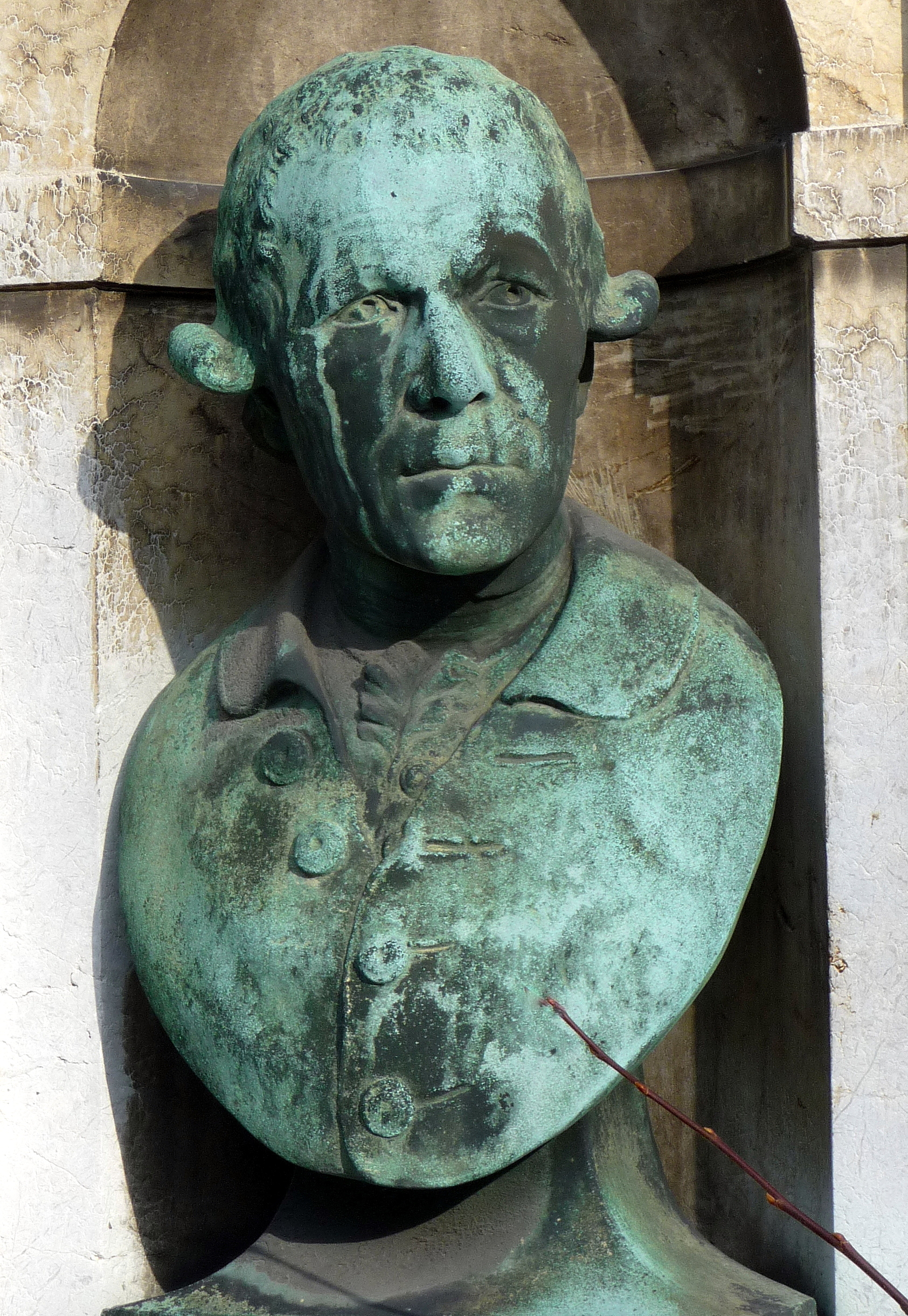 Eine Büste mit dem Portrait von Roman Anton Boos (1733-1810) befindet sich an der Kirchenmauer von St. Stephan (München).